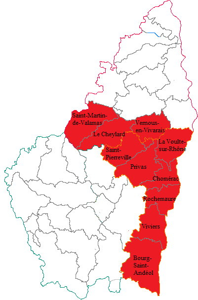 Première circonscription législative de l'Ardèche